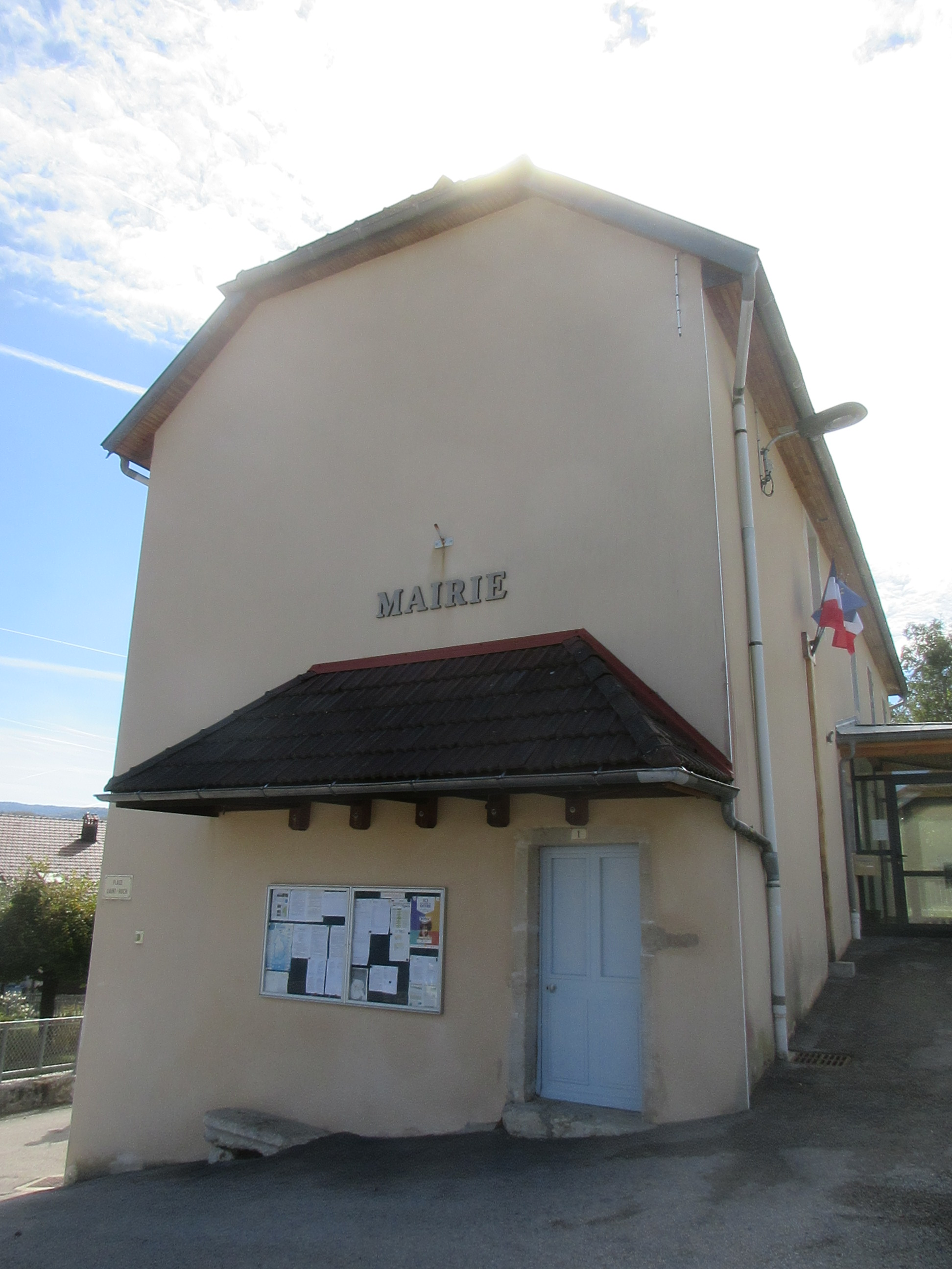 Mairie d'Avignon-lès-Saint-Claude.